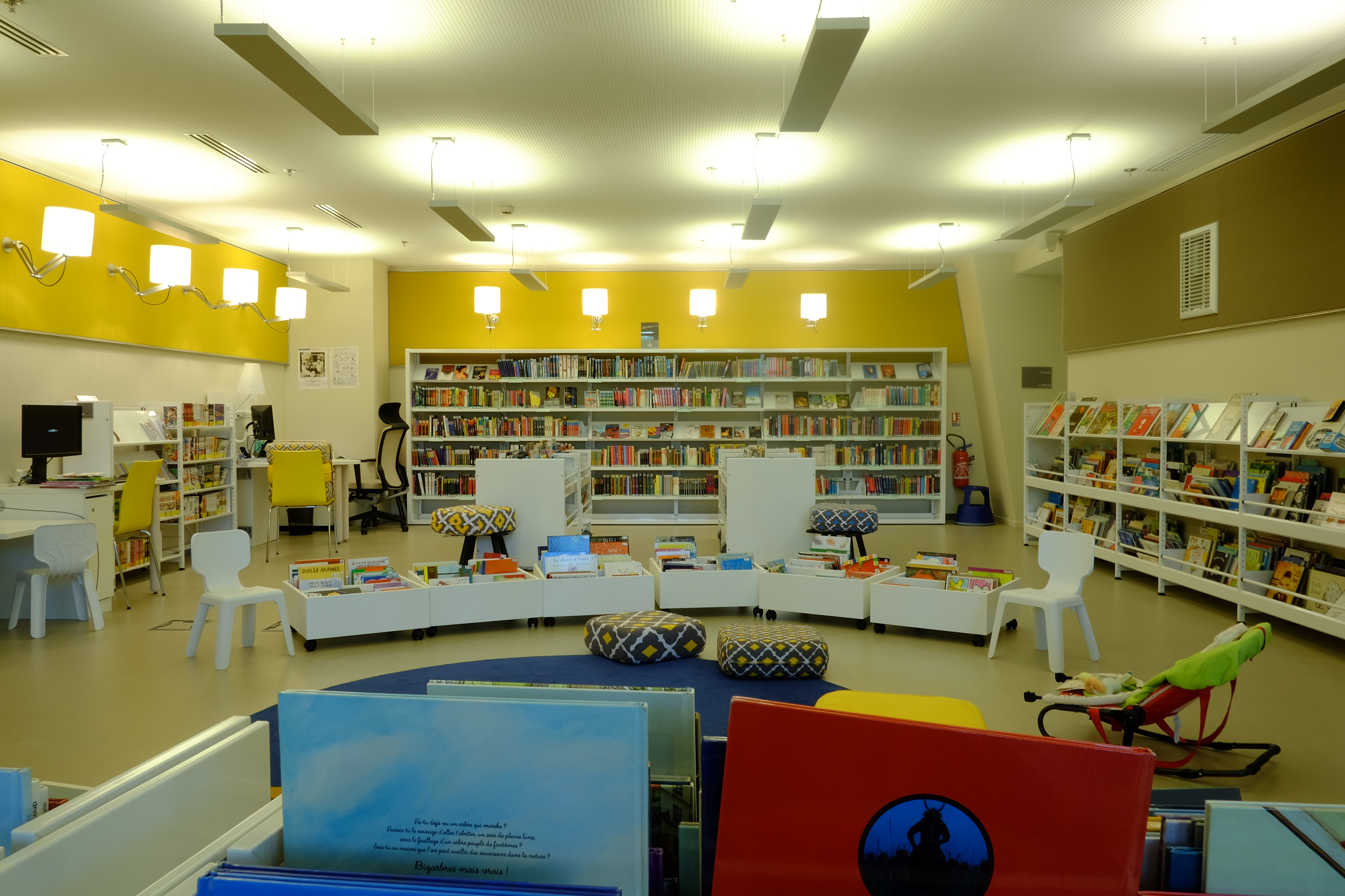 L'Espace imaginaire s'adresse aux parents et aux enfants de 0 à 12 ans